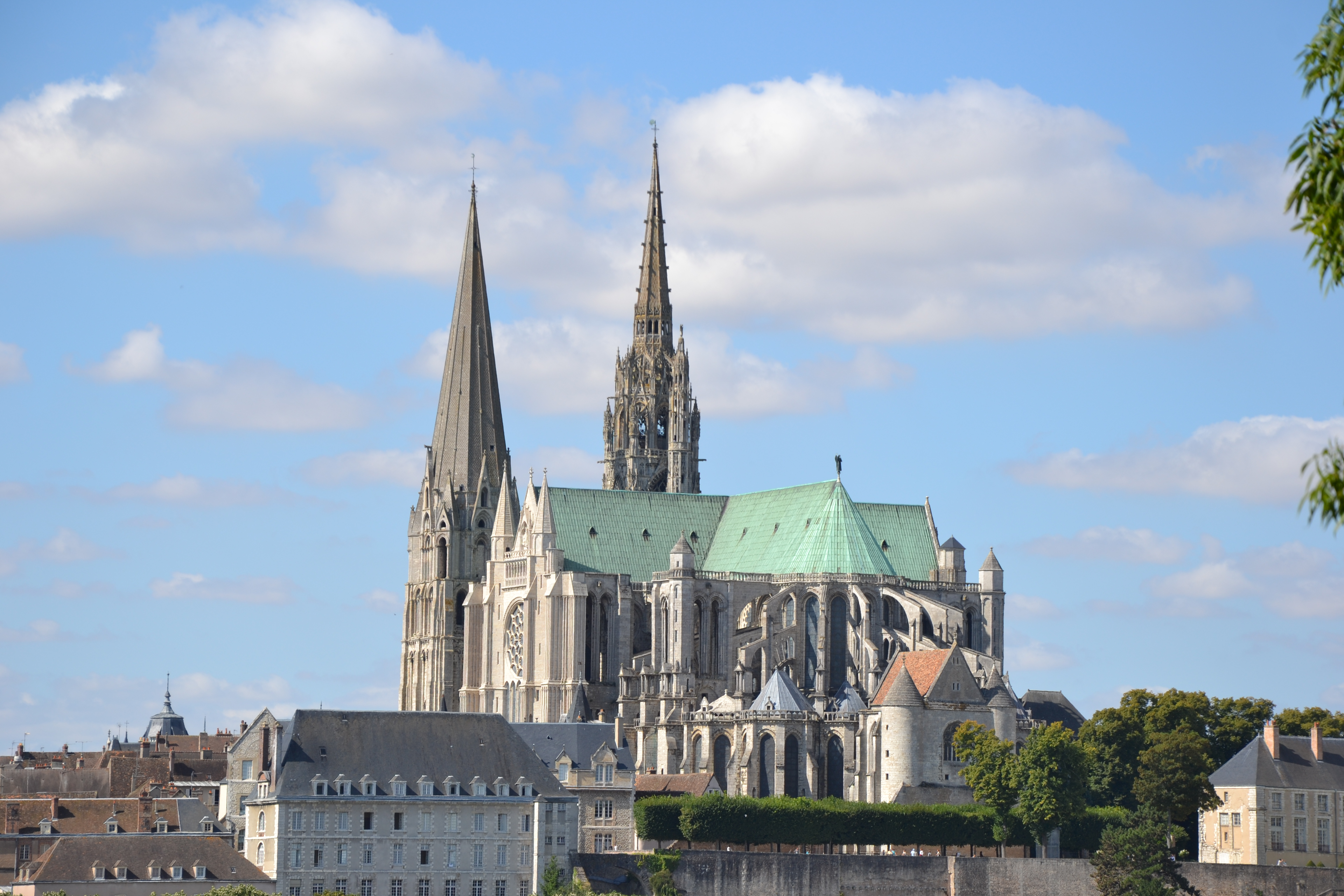 Cathédrale de Chartres (Classé, 1862) .